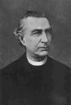 páter Vilém Platzer